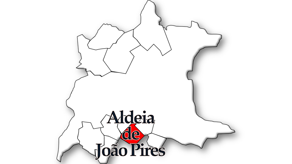 População